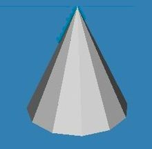 Конус